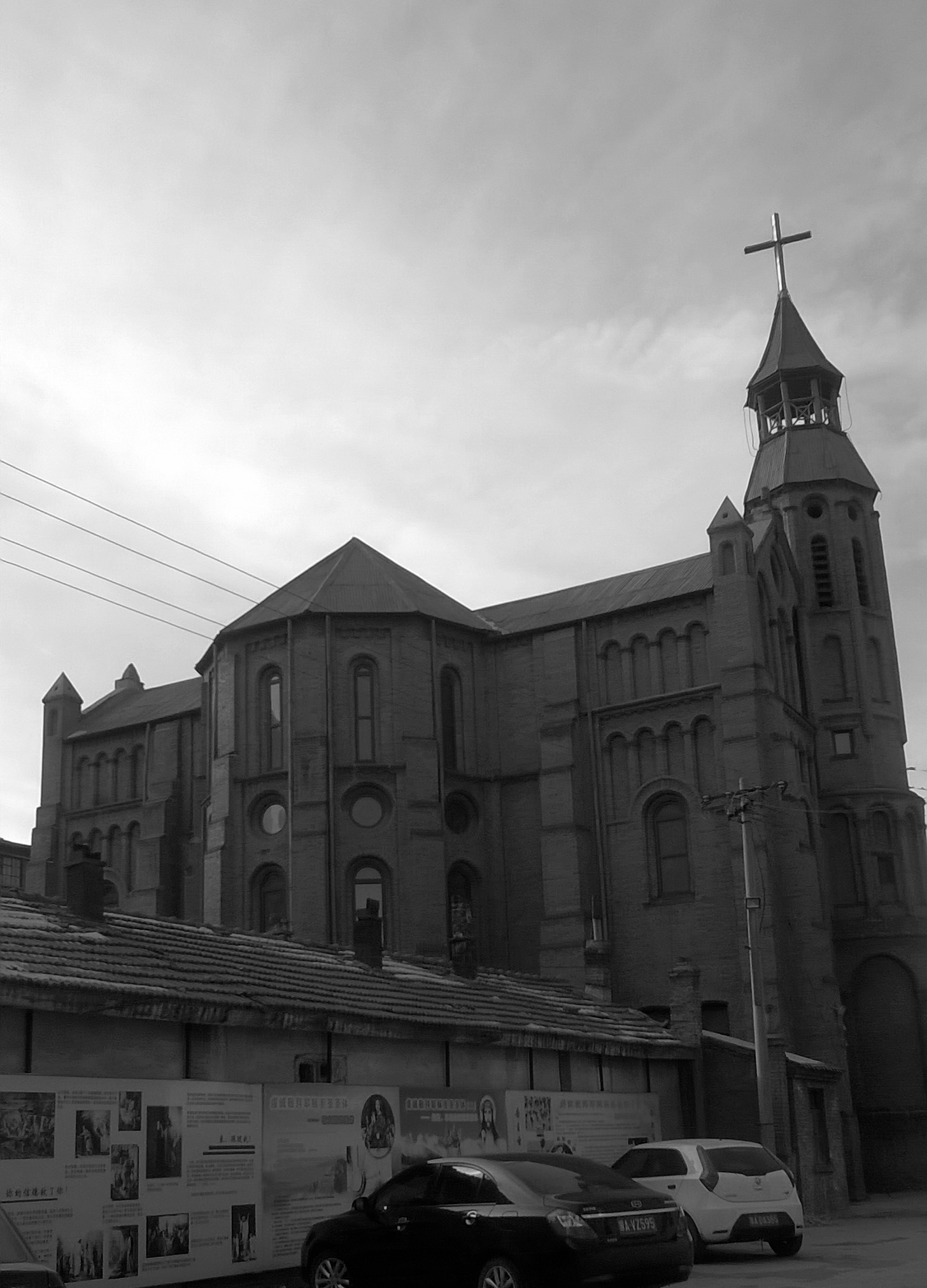 呼和浩特天主堂背面。